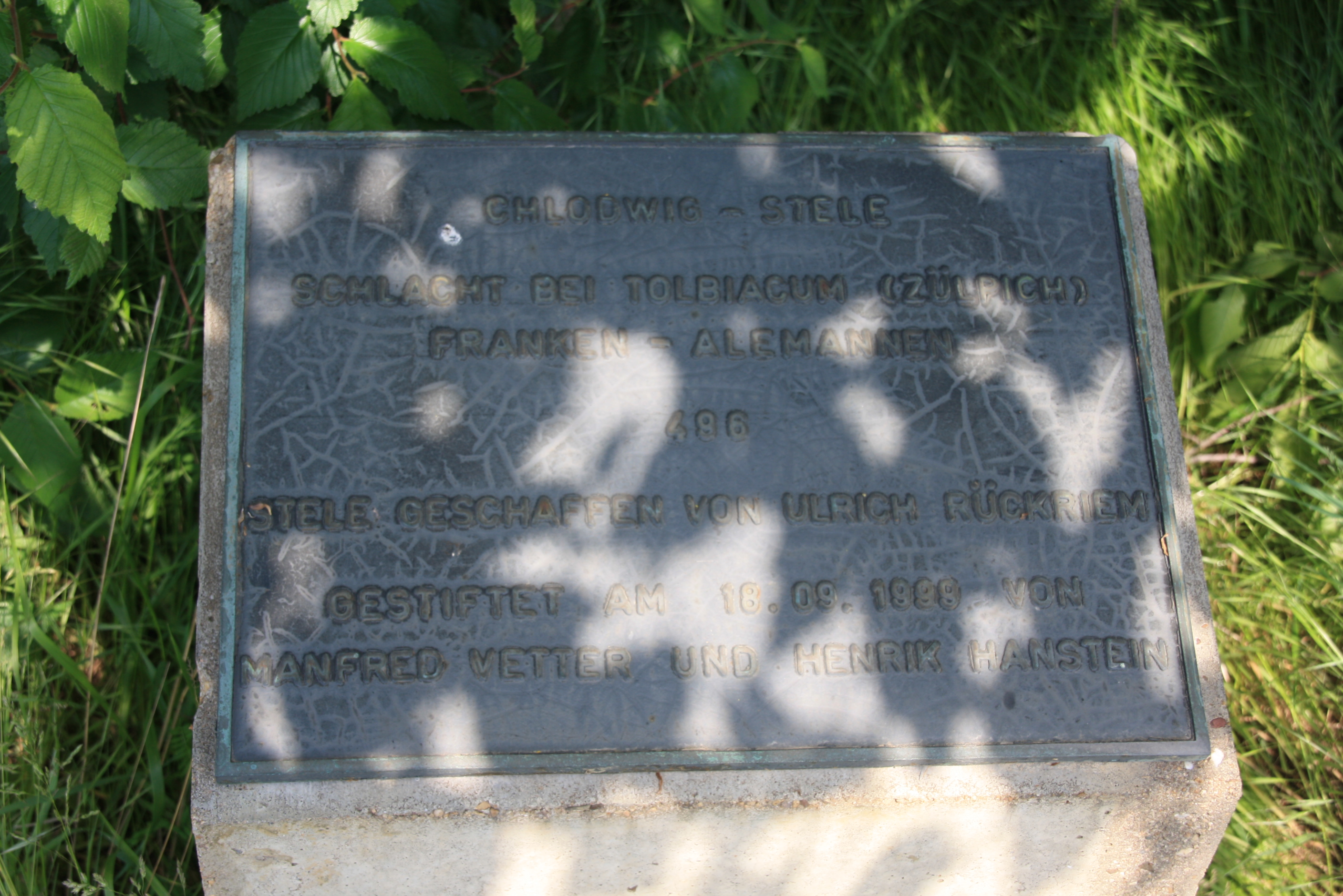 Tafel zur Chlodwigstele an der B 265 bei Zülpich-Langendorf